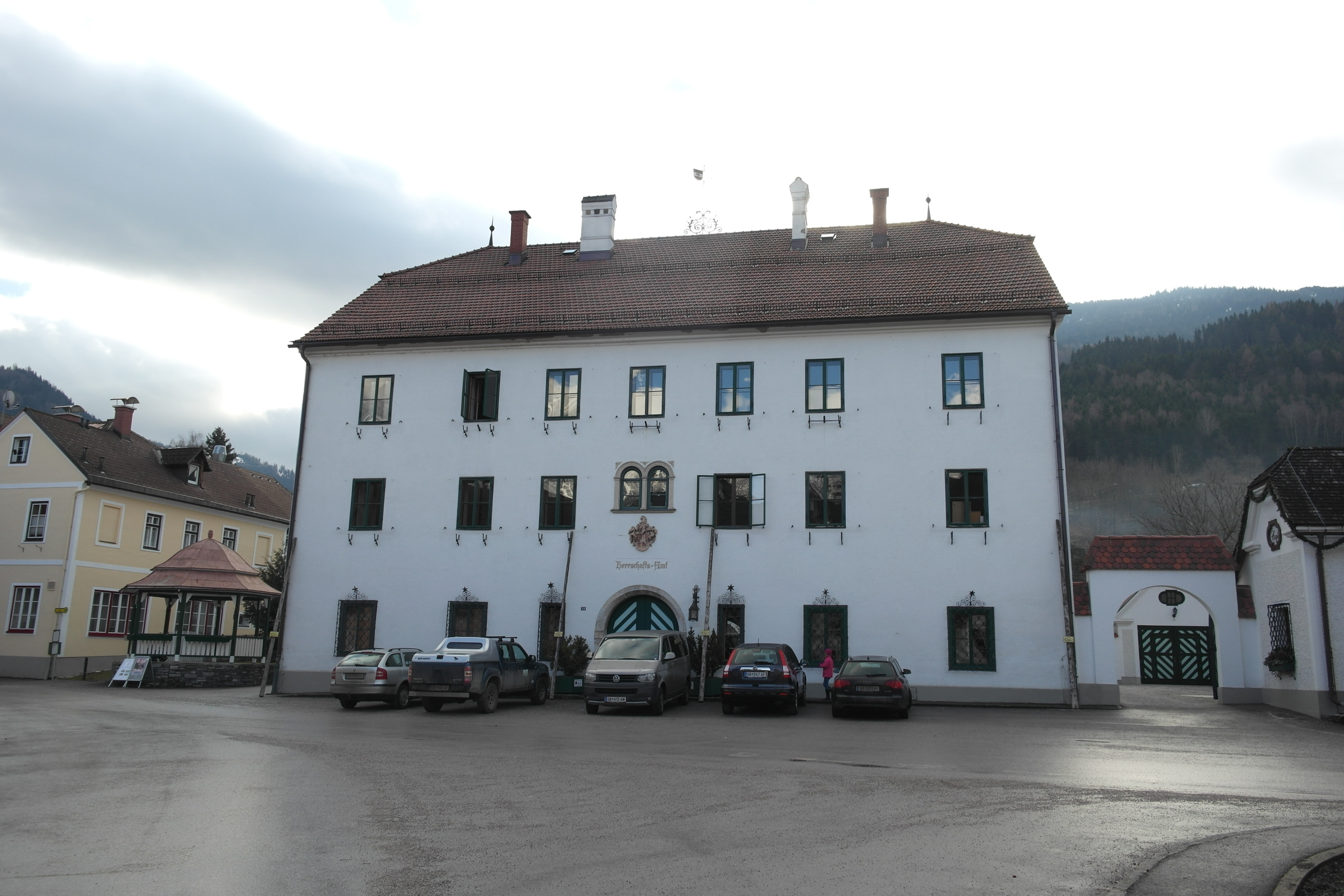 Öblarn, Herrschaftsamt, Straßenseite